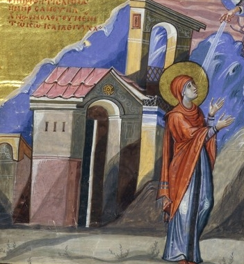 Anne, femme d'Elqana et mère de Samuel, priant (cf. 1 Samuel, chapitre 1). Miniature extraite du Psautier de Paris.